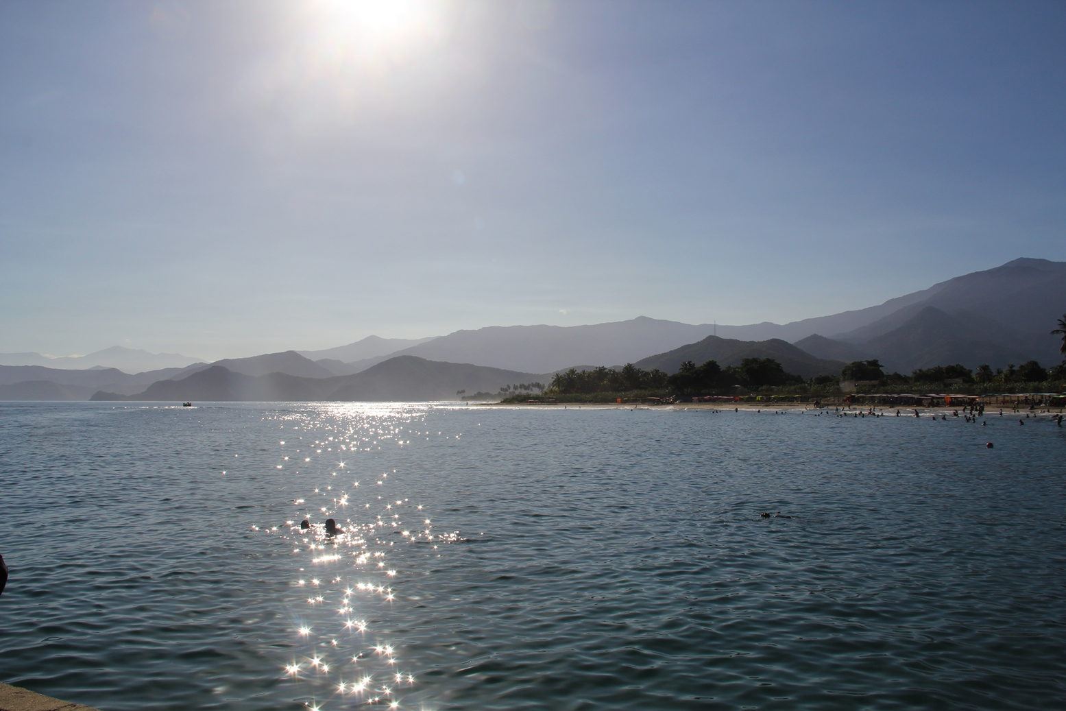 Playa quizandal (Pto Cabello - Carabobo)